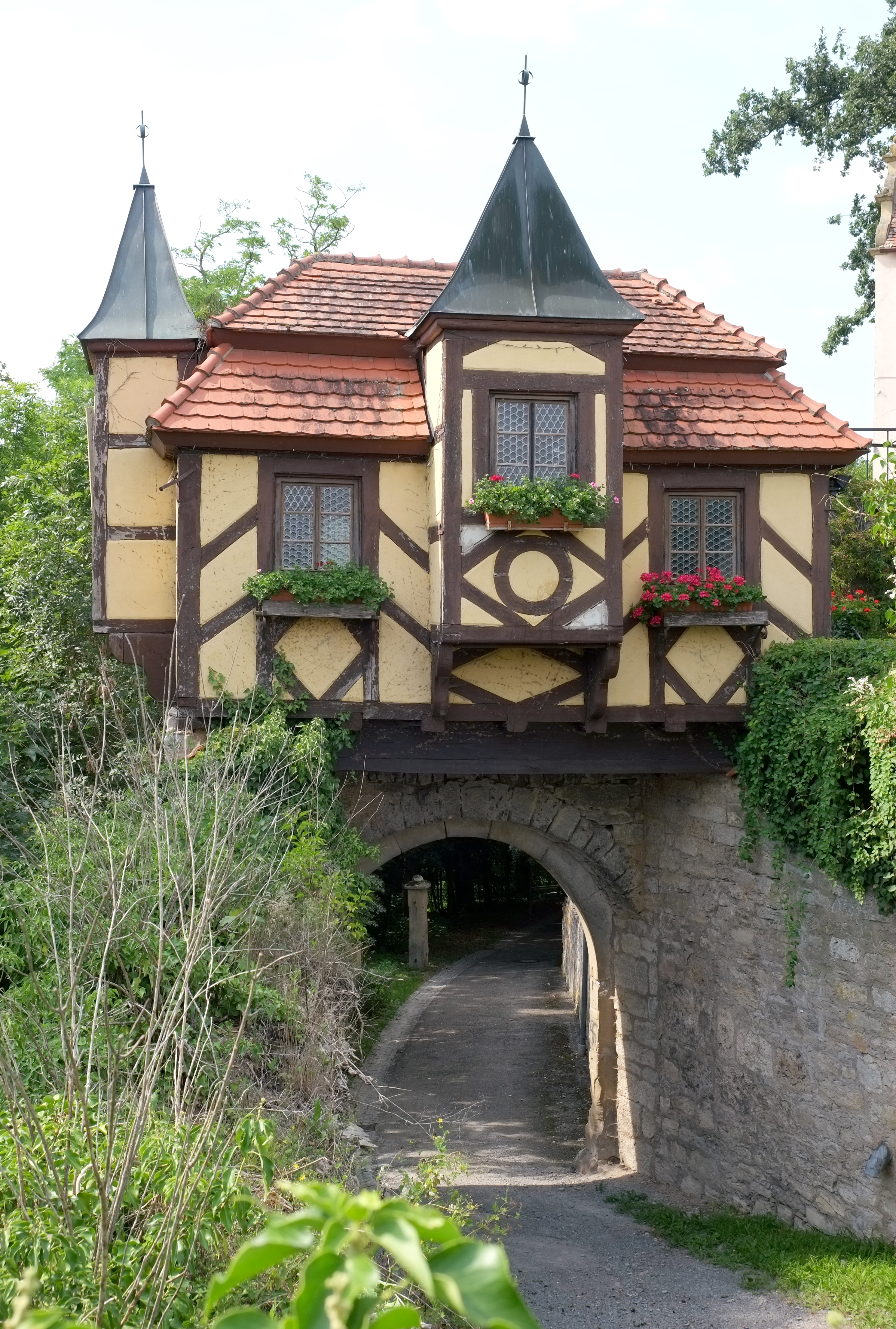 Burg in Krautheim im Hohenlohekreis (Baden-Württemberg, Deutschland)